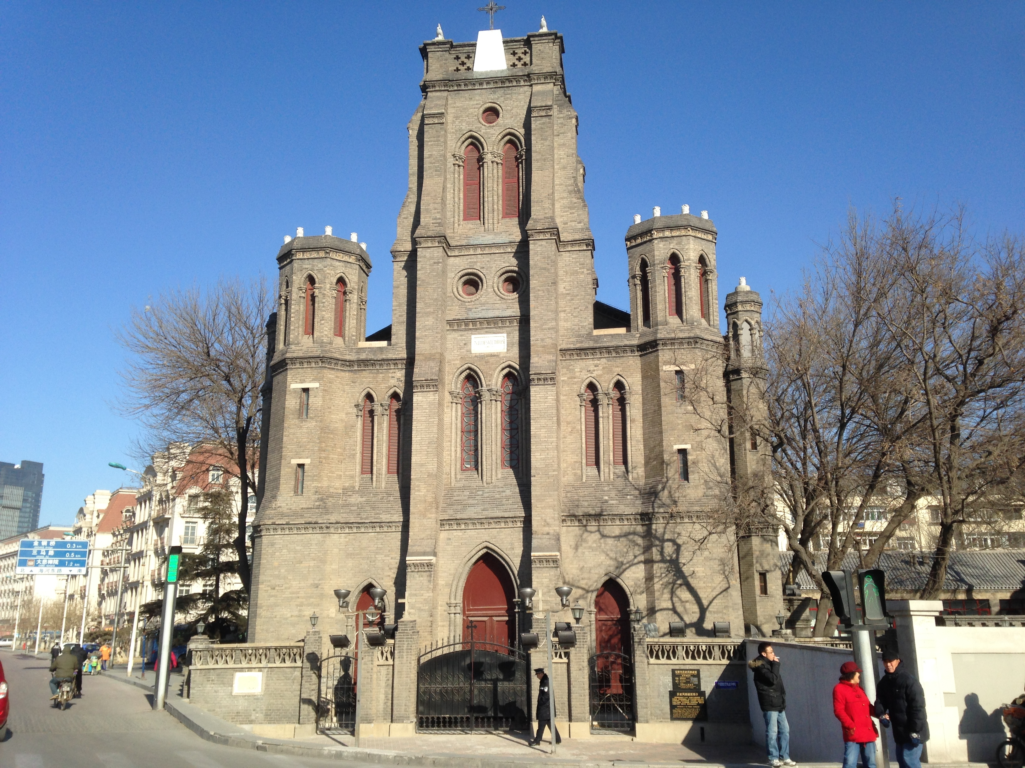 望海楼教堂